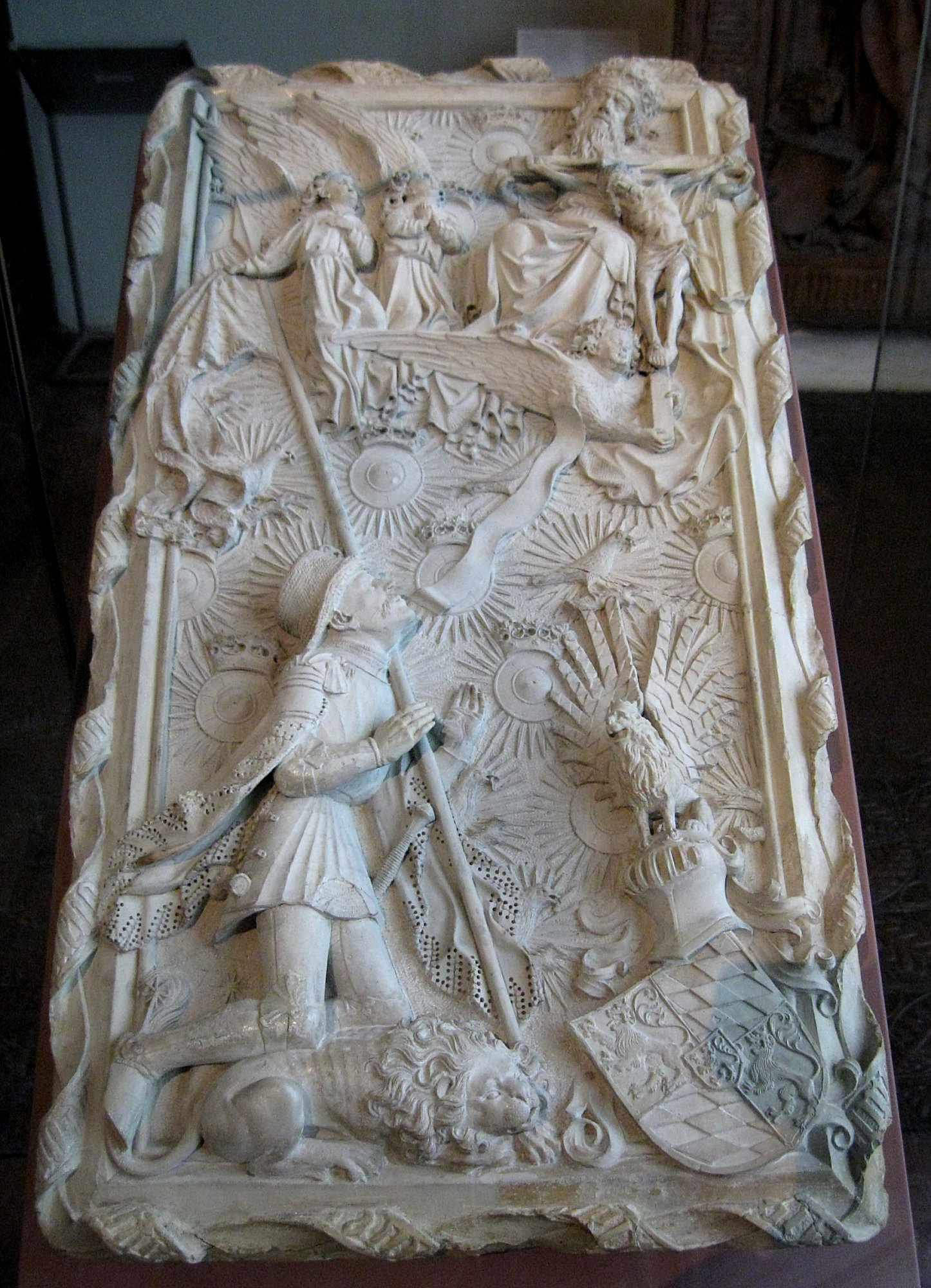 Hans Multscher (zugeschrieben): Modell eines geplanten Grabmals für Herzog Ludwig den Gebarteten , 1430, Solnhofer Kalkstein, Bayerisches Nationalmuseum